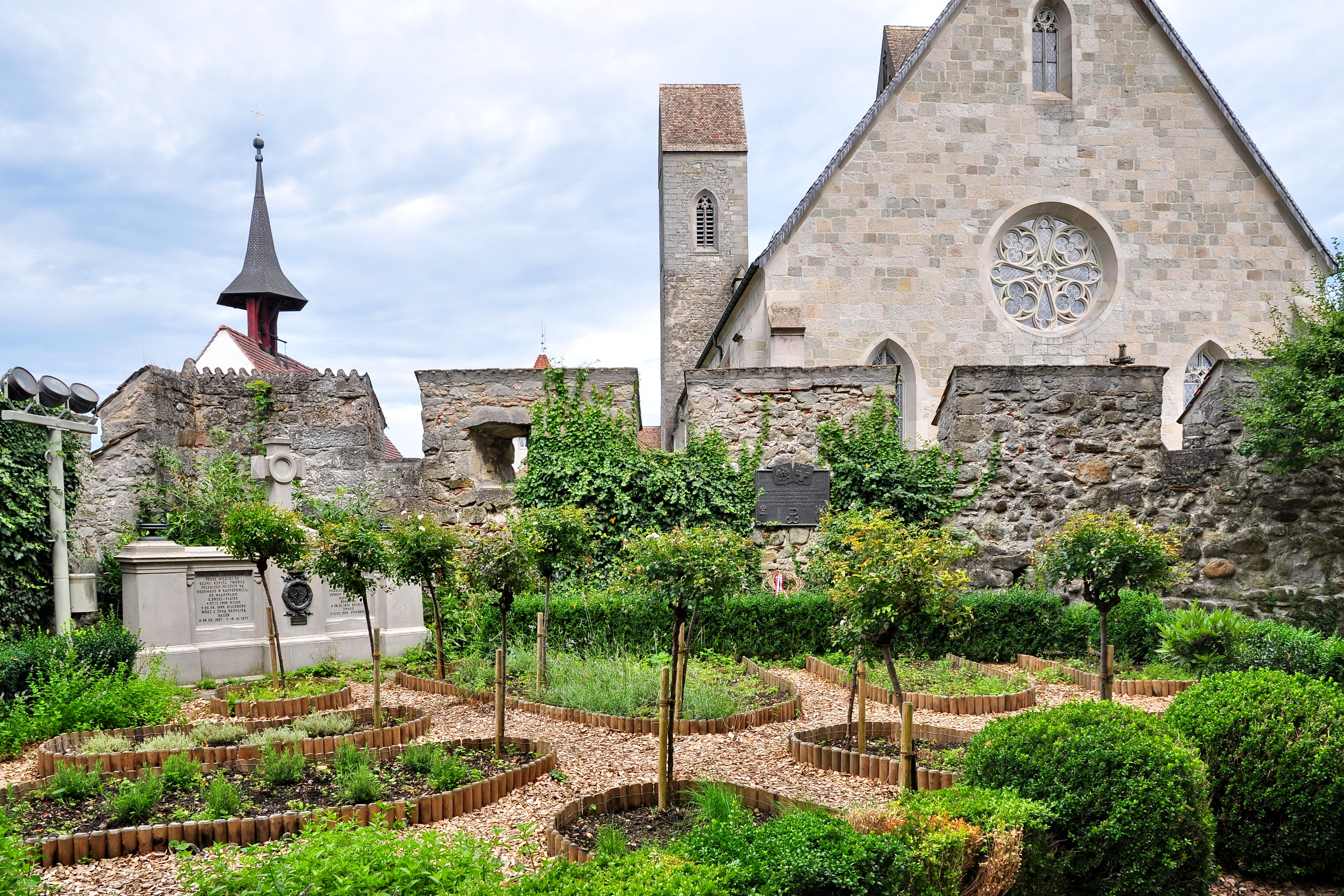 Kräutergarten und Polnisches Gartendenkmal (herbal garden and Polish garden memorial) at 'the' Schloss (castle) in Rapperswil (Switzerland), Stadtpfarrkirche (St. John's church) in the background.